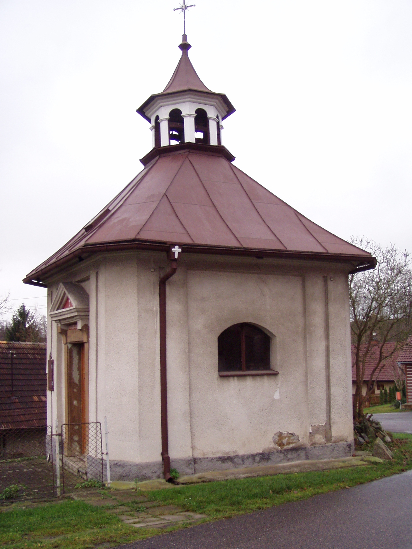 Kaple Navštívení Panny Marie (Masty)